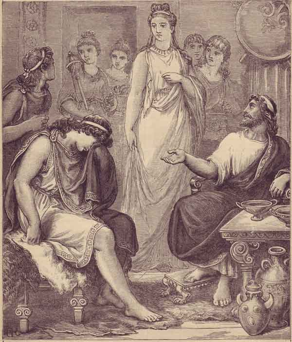 Telemachos im Palast von Menelaos